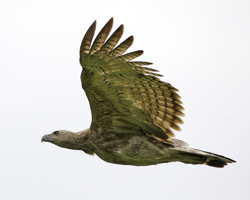 Kazaringa, Assam, India April 15, 2008 690V4565